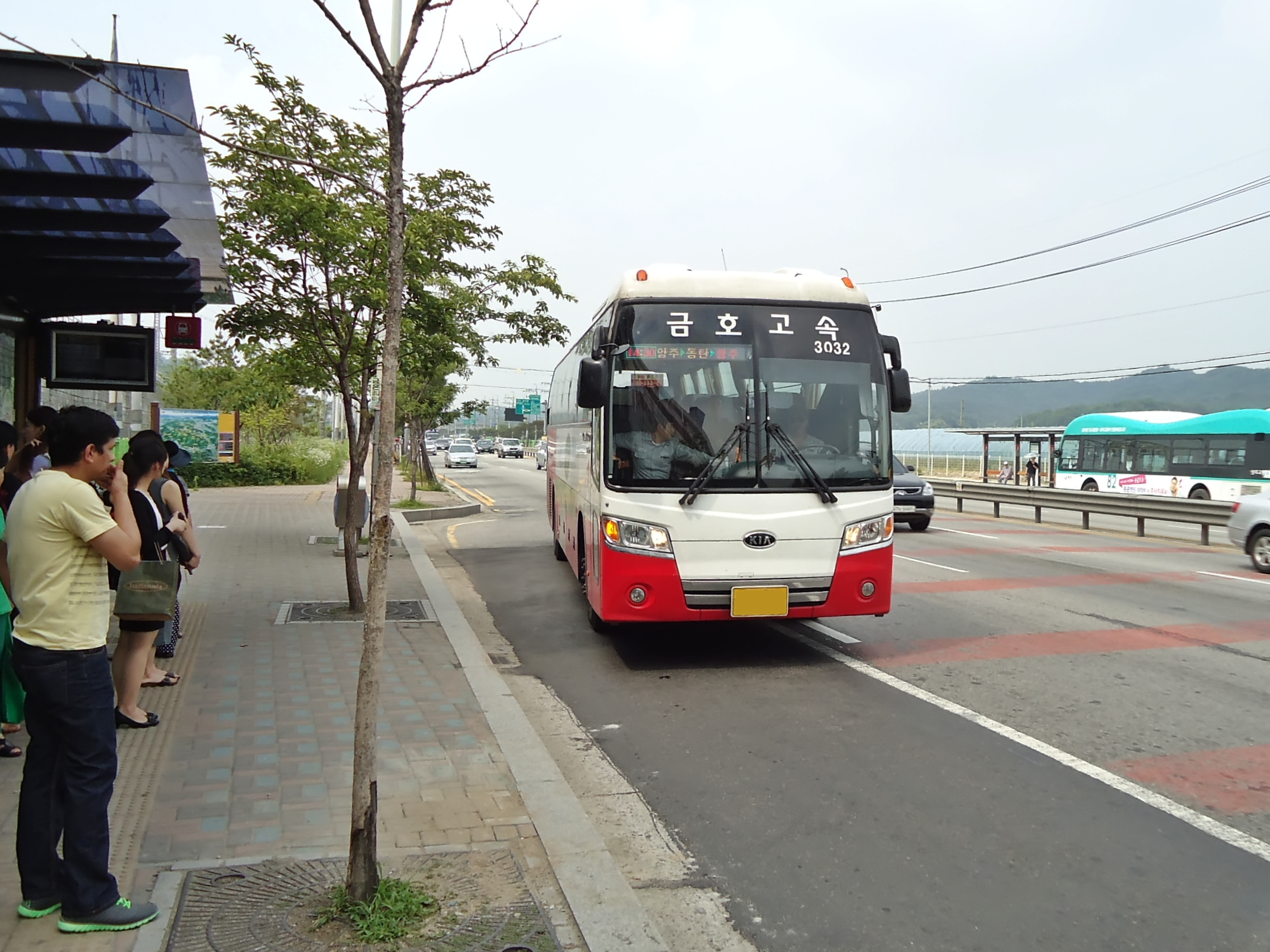 양주역시외버스정류장에 들어오는 금호고속 시외버스(동두천, 양주역-동탄-광주광역시)